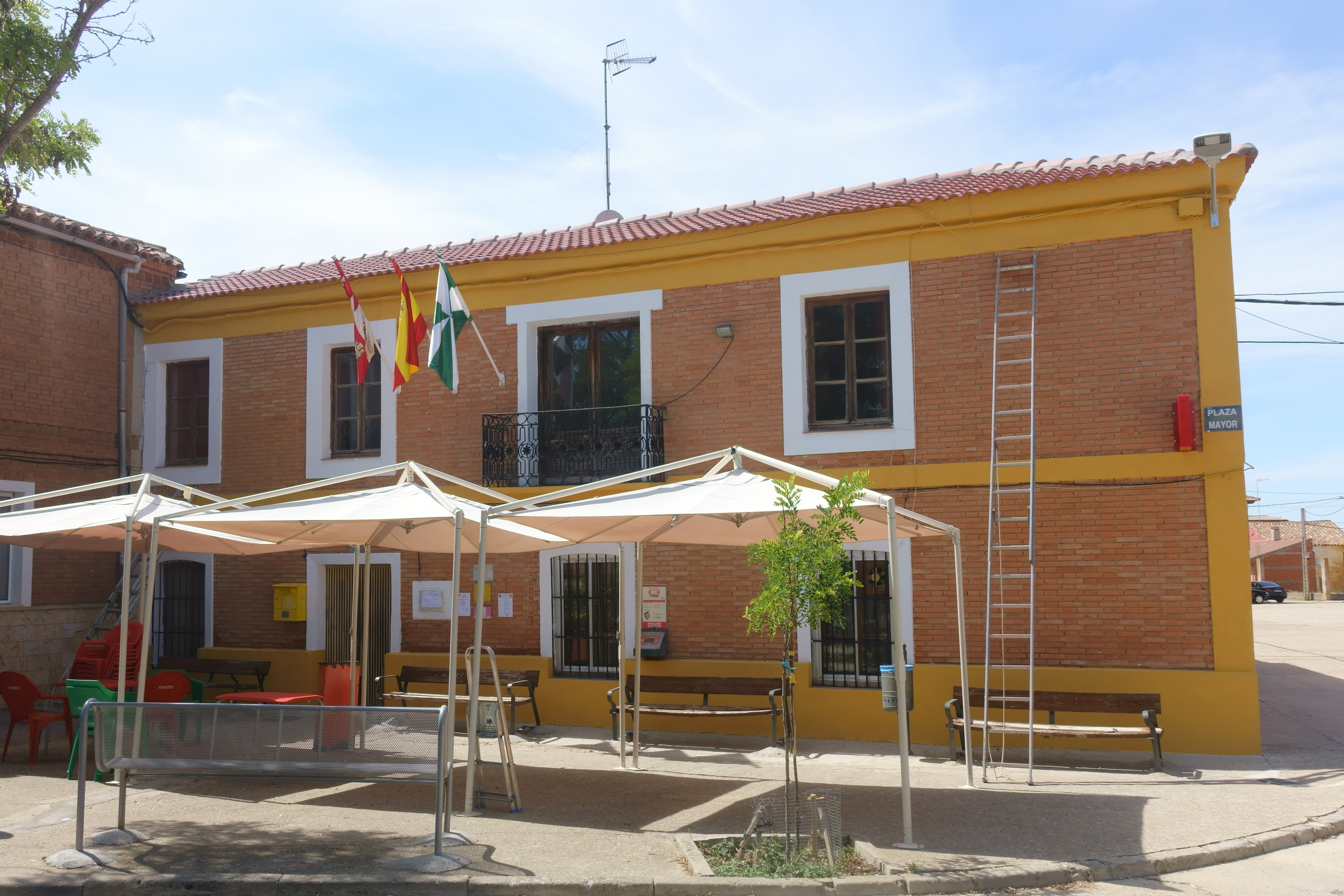 Casa consistorial de Valverde de Campos (Valladolid, España).